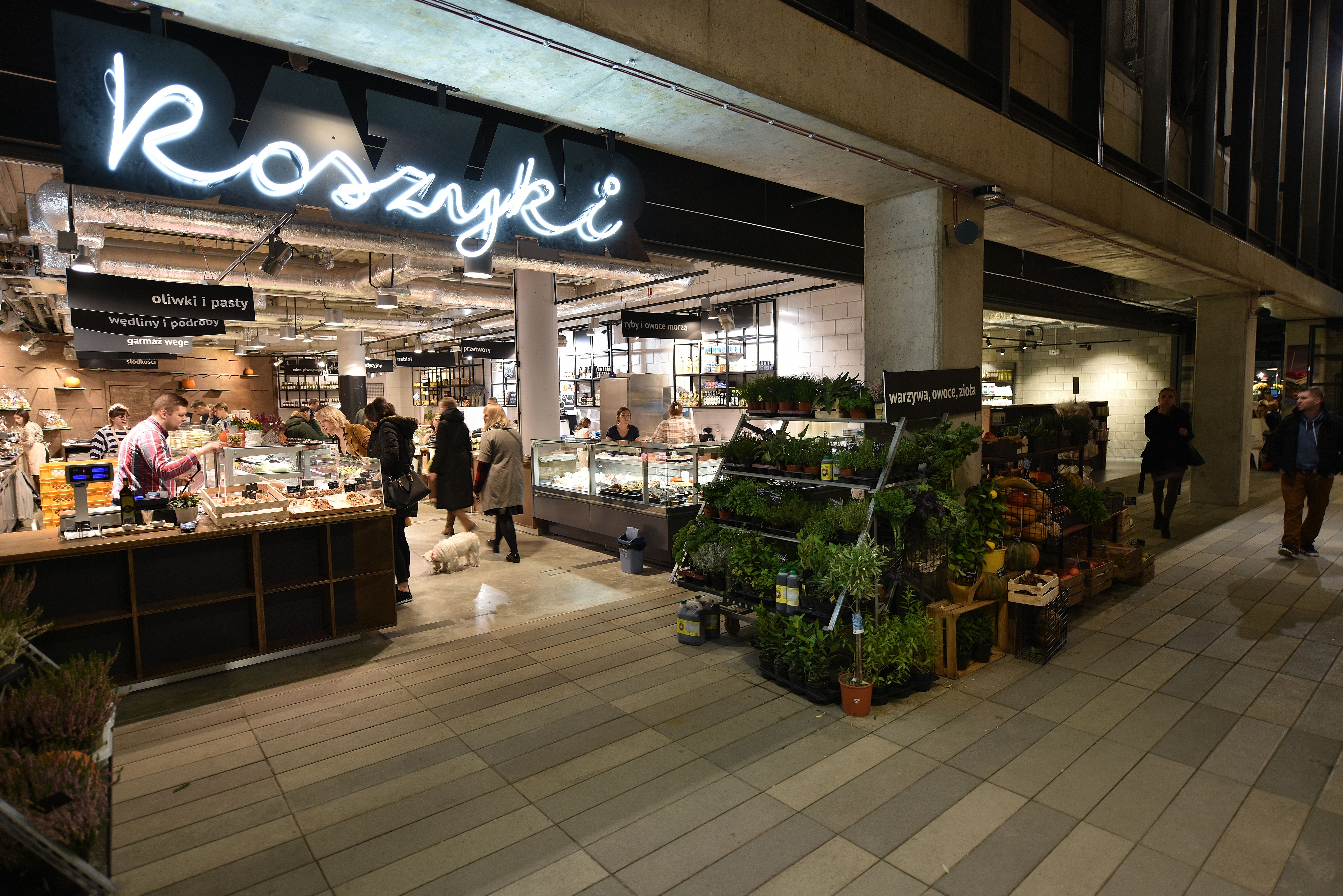 Hala Koszyki w Warszawie